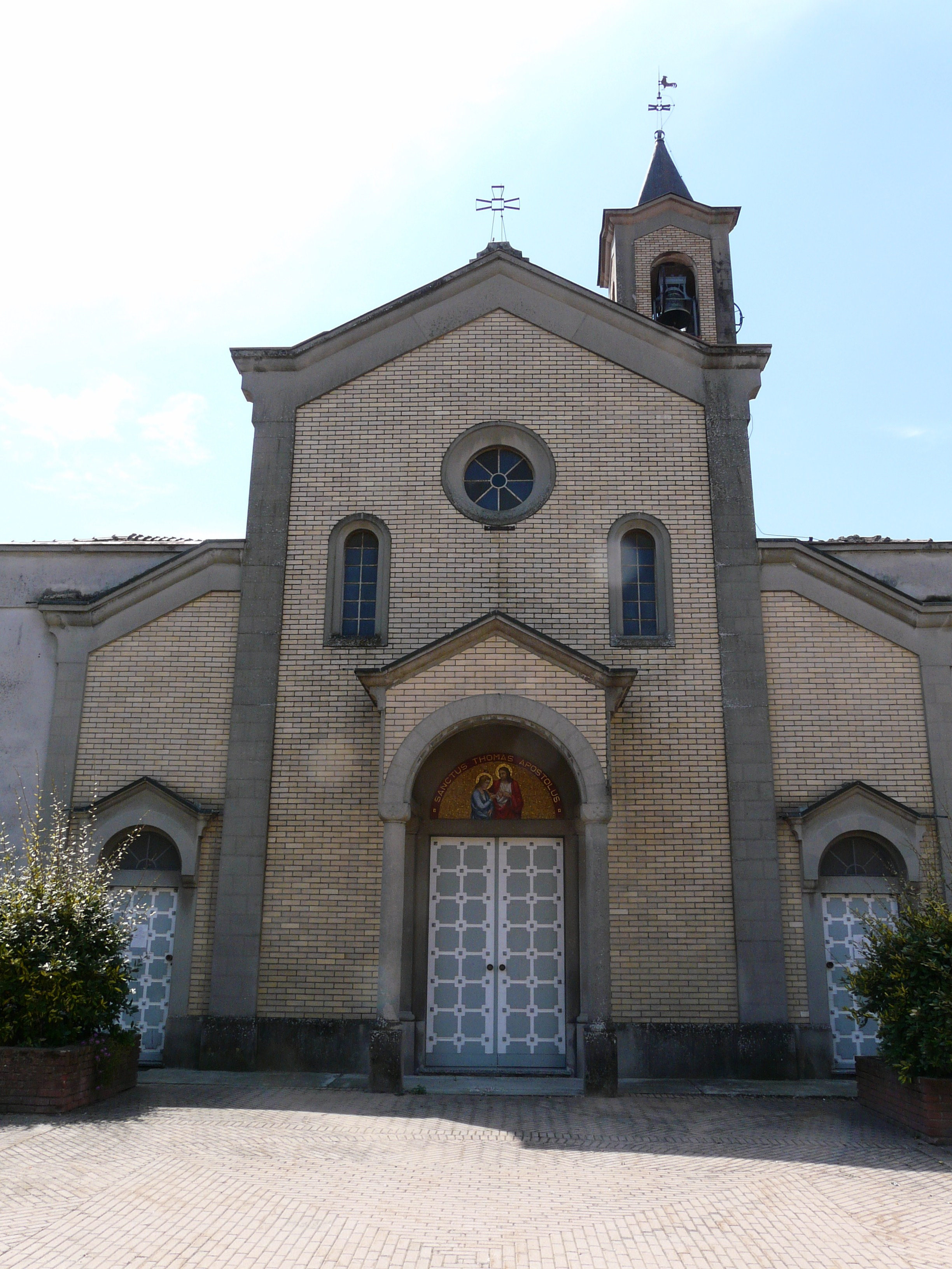 Chiesa di San Tommaso, Castellar Guidobono, Piemonte, Italia